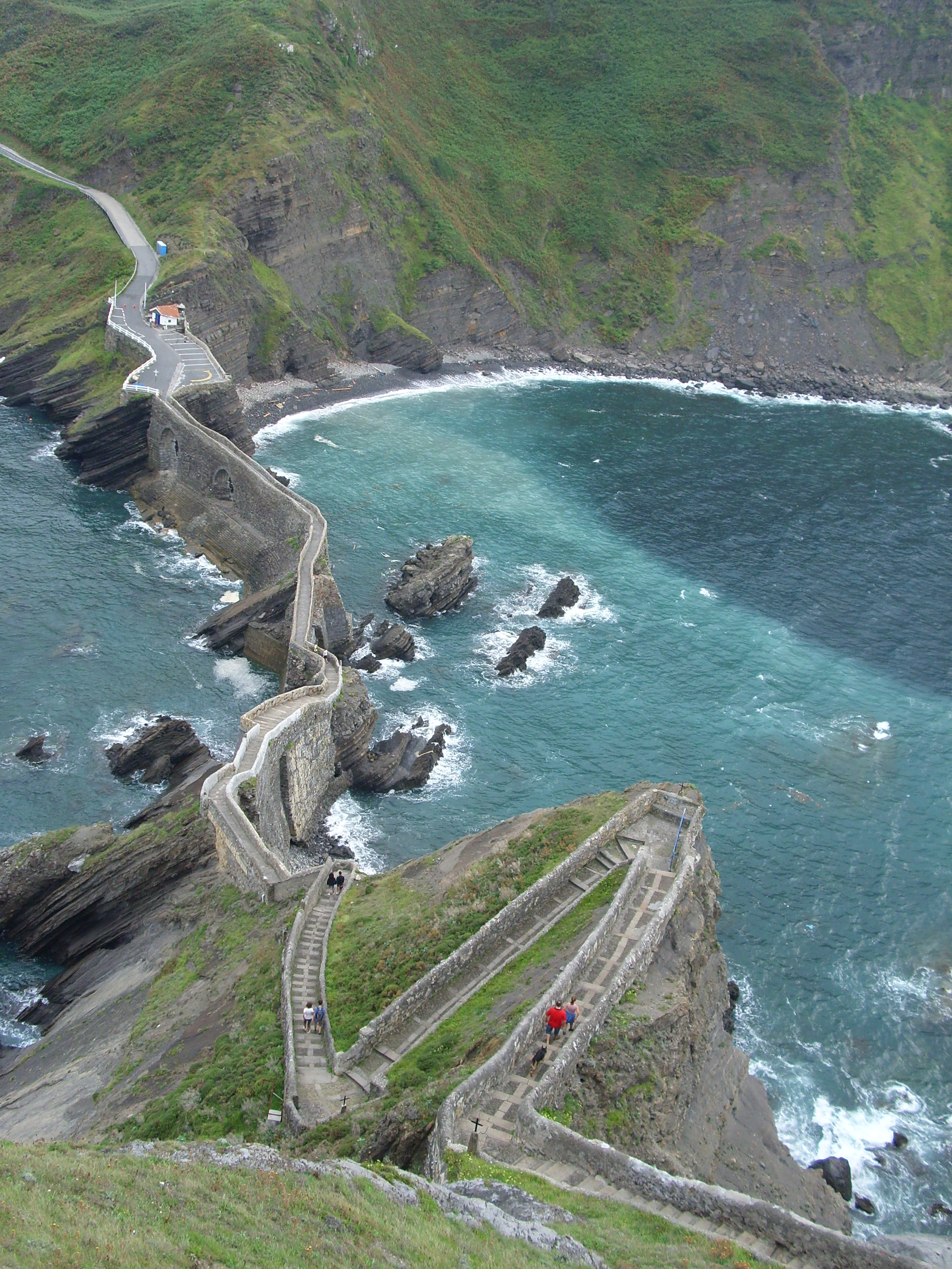 Ermita de Gaztelugatxe, Bizkaia